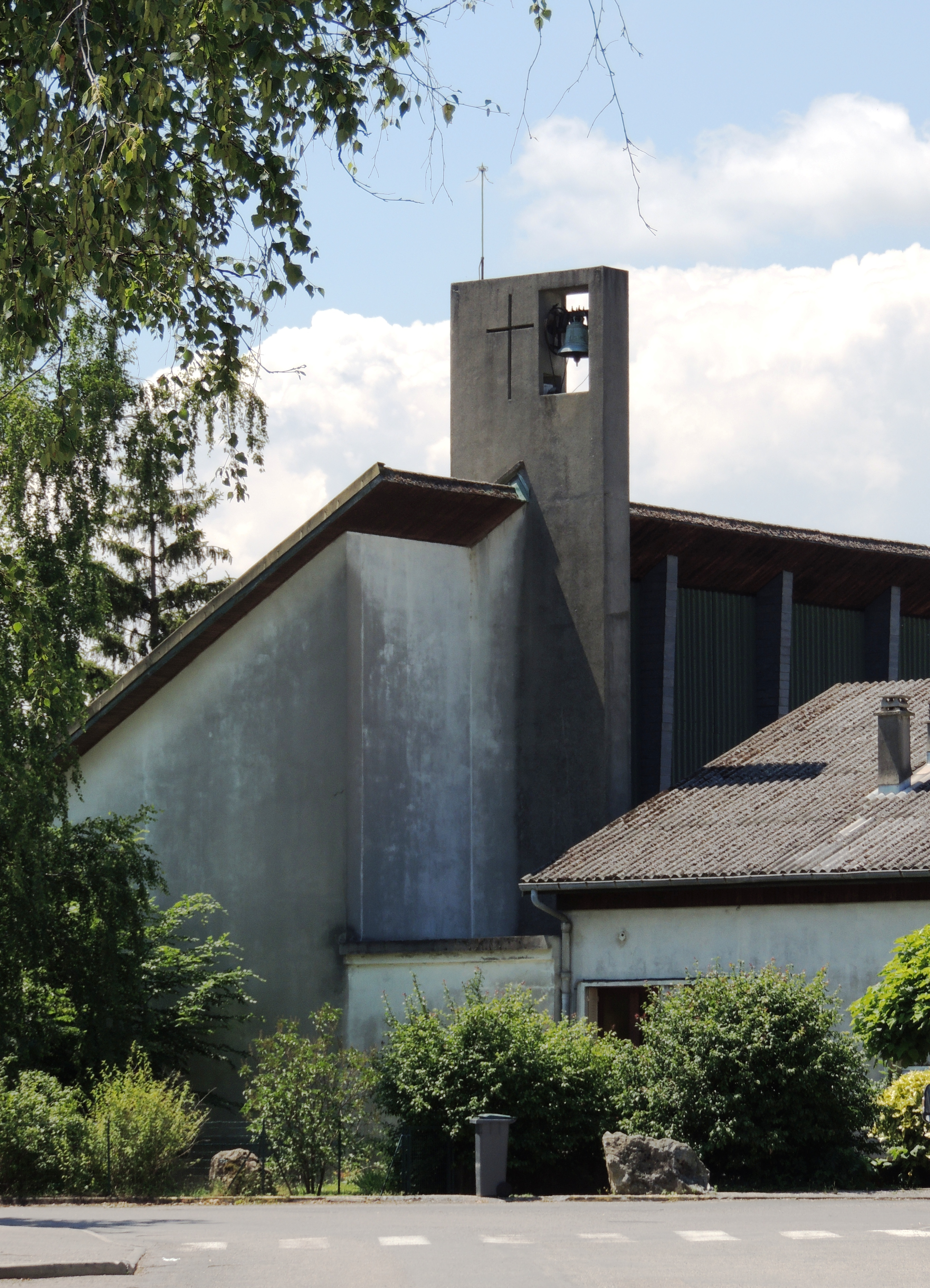 Eglise catholique Saint-Michel de Champ-sur-Drac.